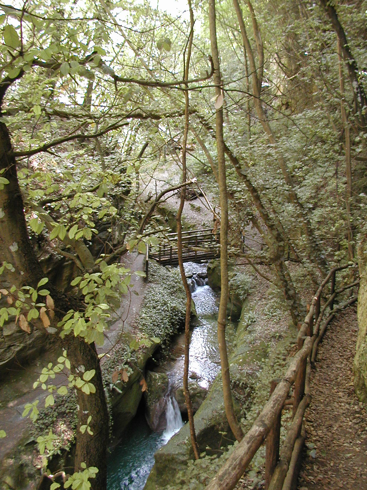 Natur pur